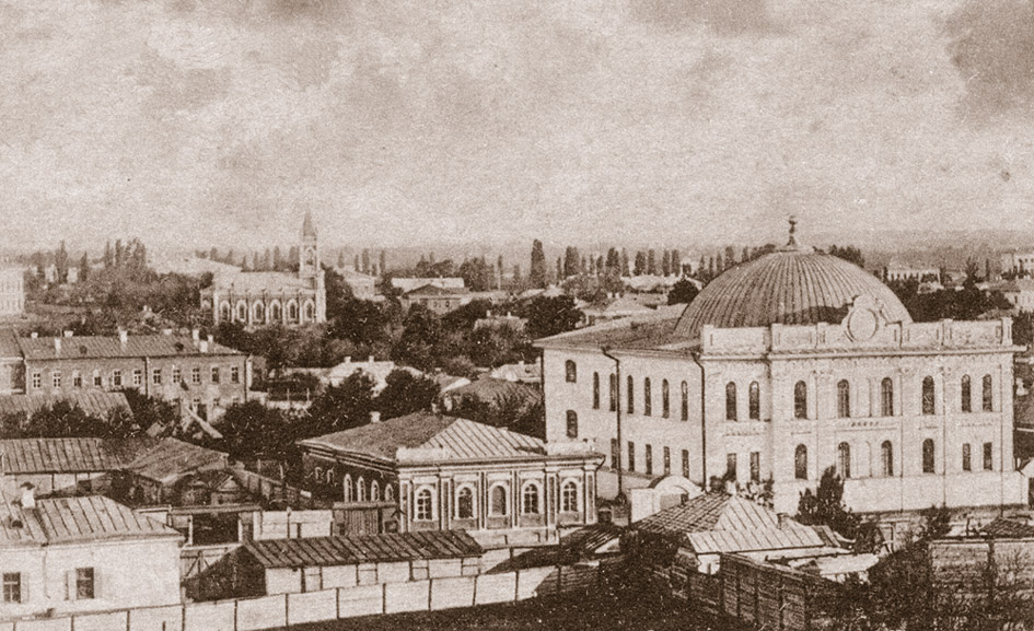 Фото зроблене наприкінці 19 ст. Автор - невідомий. На задньому плані - лютеранська кірха, на передньому - Велика хоральна синагога, збудована в 1856 р.